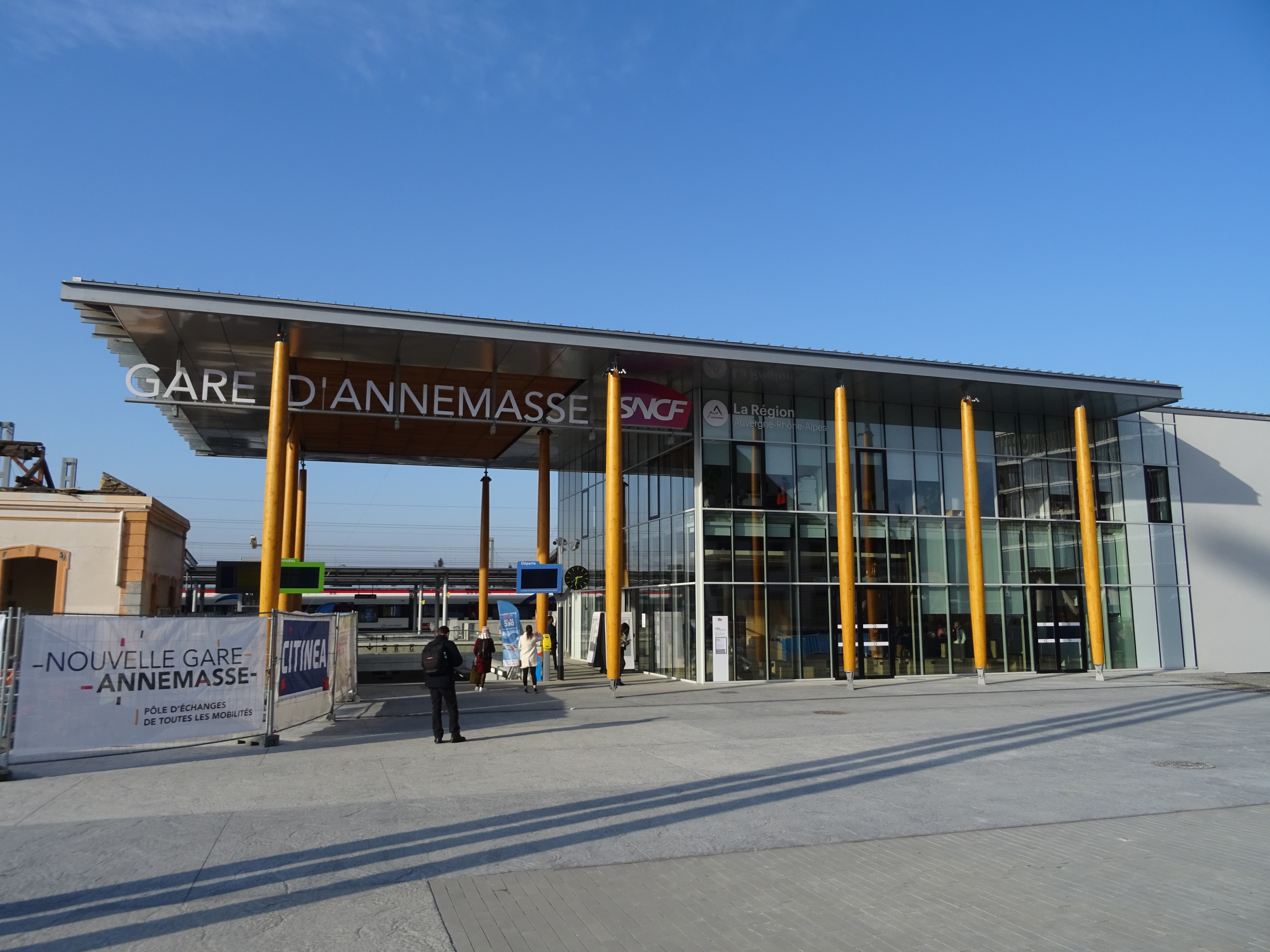 Bâtiment voyageurs et entrée de la gare d'Annemasse.